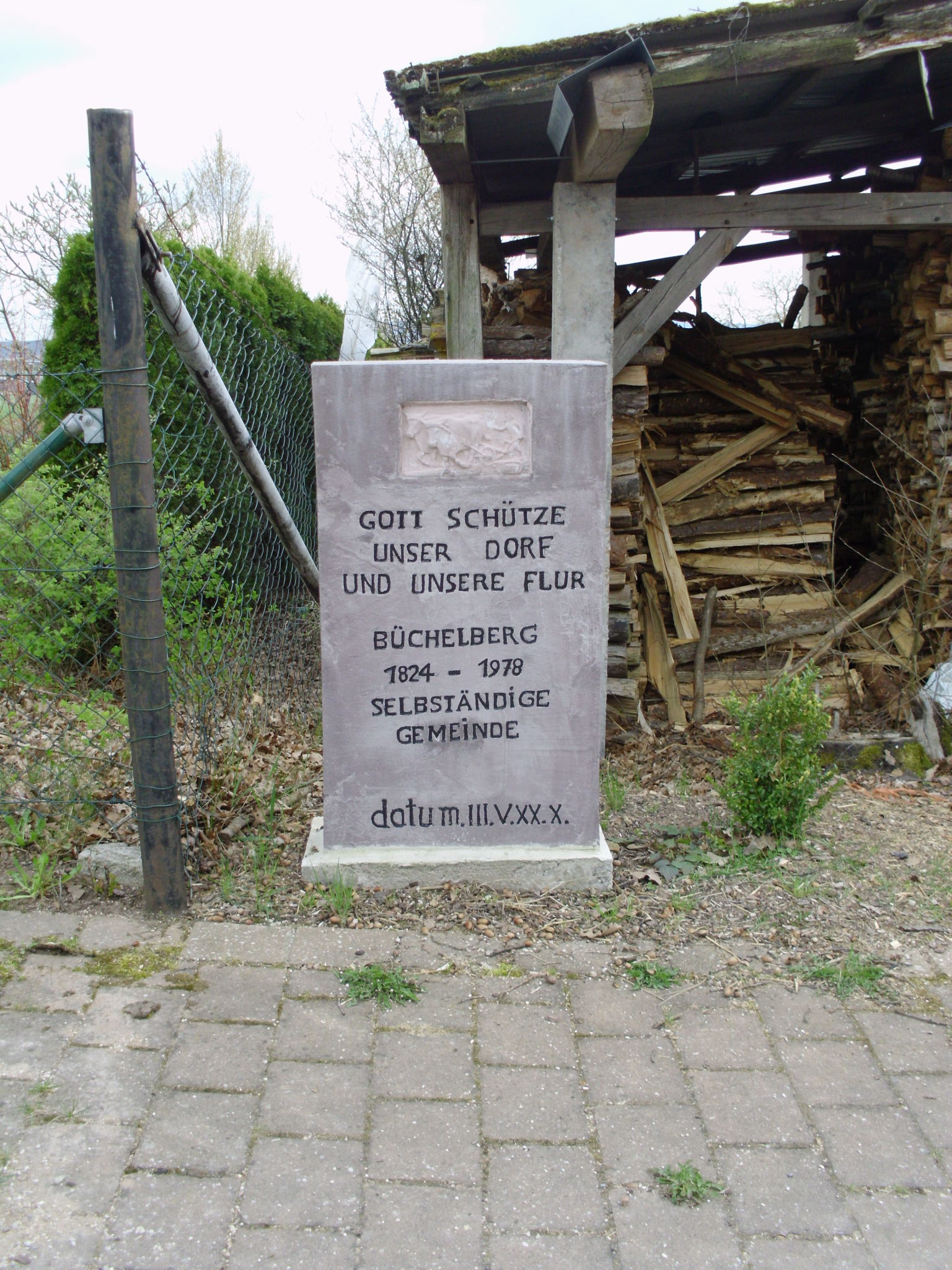 Gedenkstein an die ehenmalige Gemeinde Büchelberg, heute Ortsteil von Gunzenhausen im mittelfränkischen Landkreis Weißenburg-Gunzenhausen